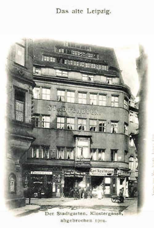 Das Haus „Stadtgarten“ in Leipzig, Klostergasse 13 um 1900. Das Haus wurde 1904 wegen der Errichtung des Hauses Barfußgäßchen 11 (heute Teil des Trifugiums) abgerissen.